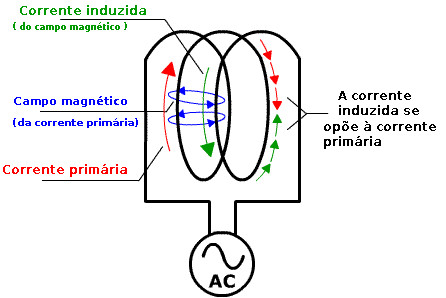 lei de lenz